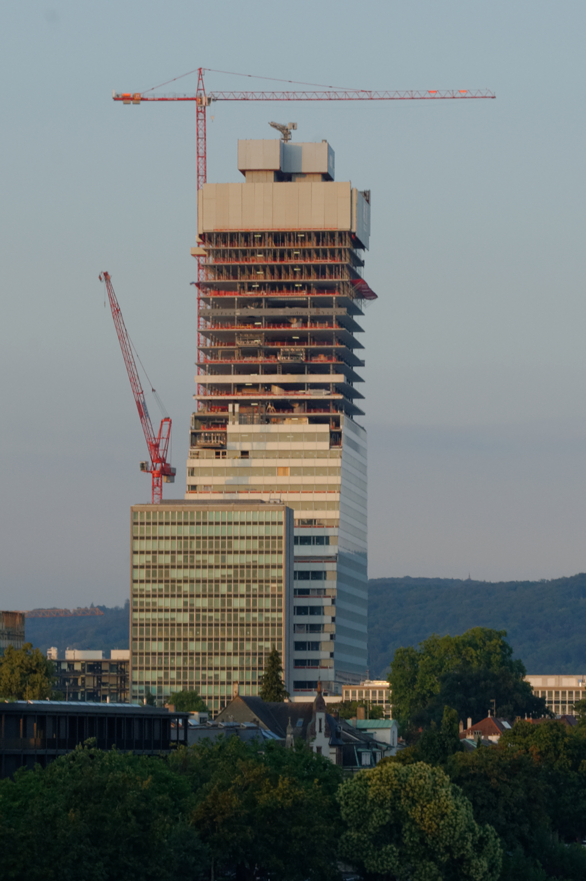 Roche Tower im Bau, Sommer 2014